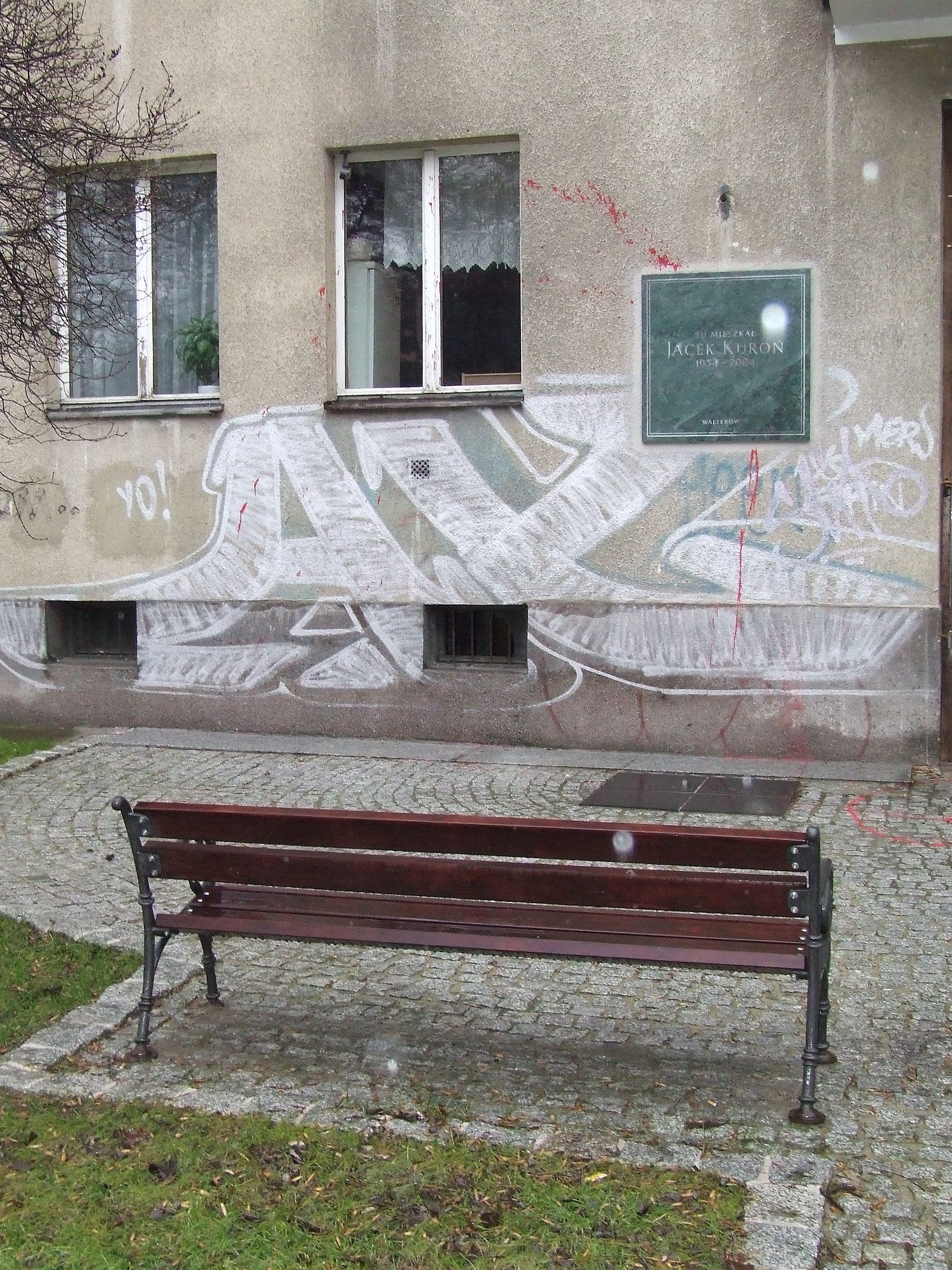 Mieszkanie Jacka Kuronia - tablica pamiątkowa przy ul. Mickiewicza